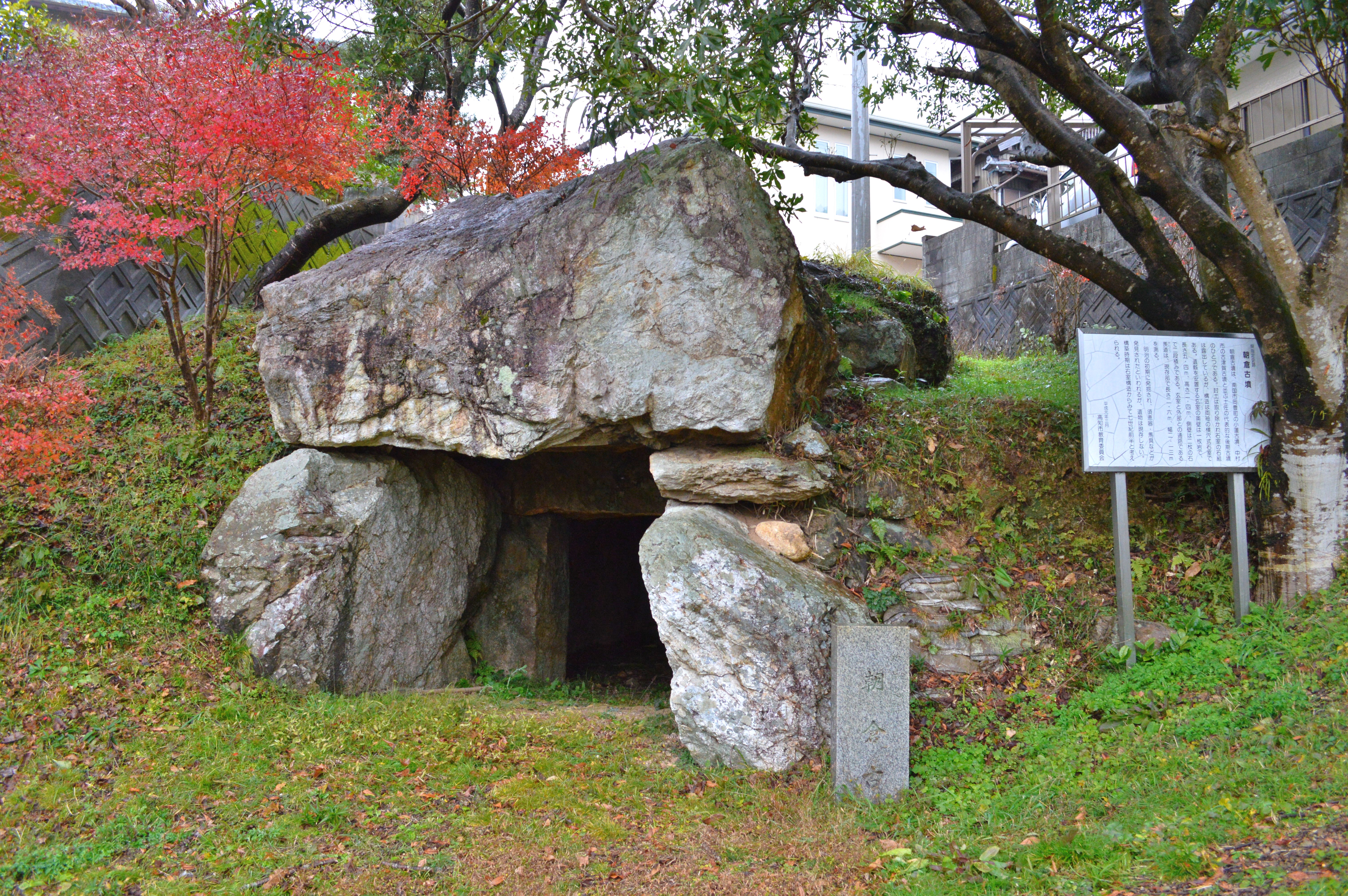 朝倉古墳 (高知市) 概観